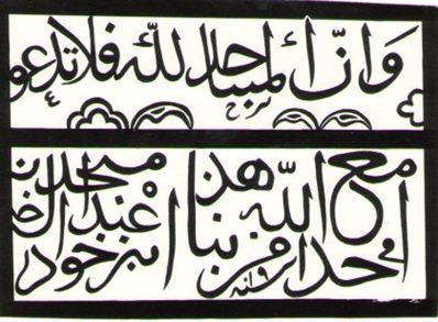 Dəstə- Meydan məscidinin kitabəsi